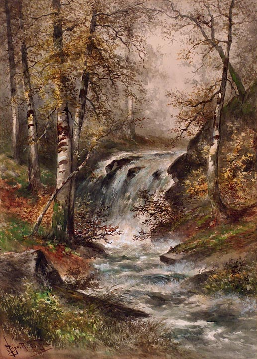 Гуго Антон Фишер (1854-1916).Пейзаж с водопадом. Акварель, 22 x 30